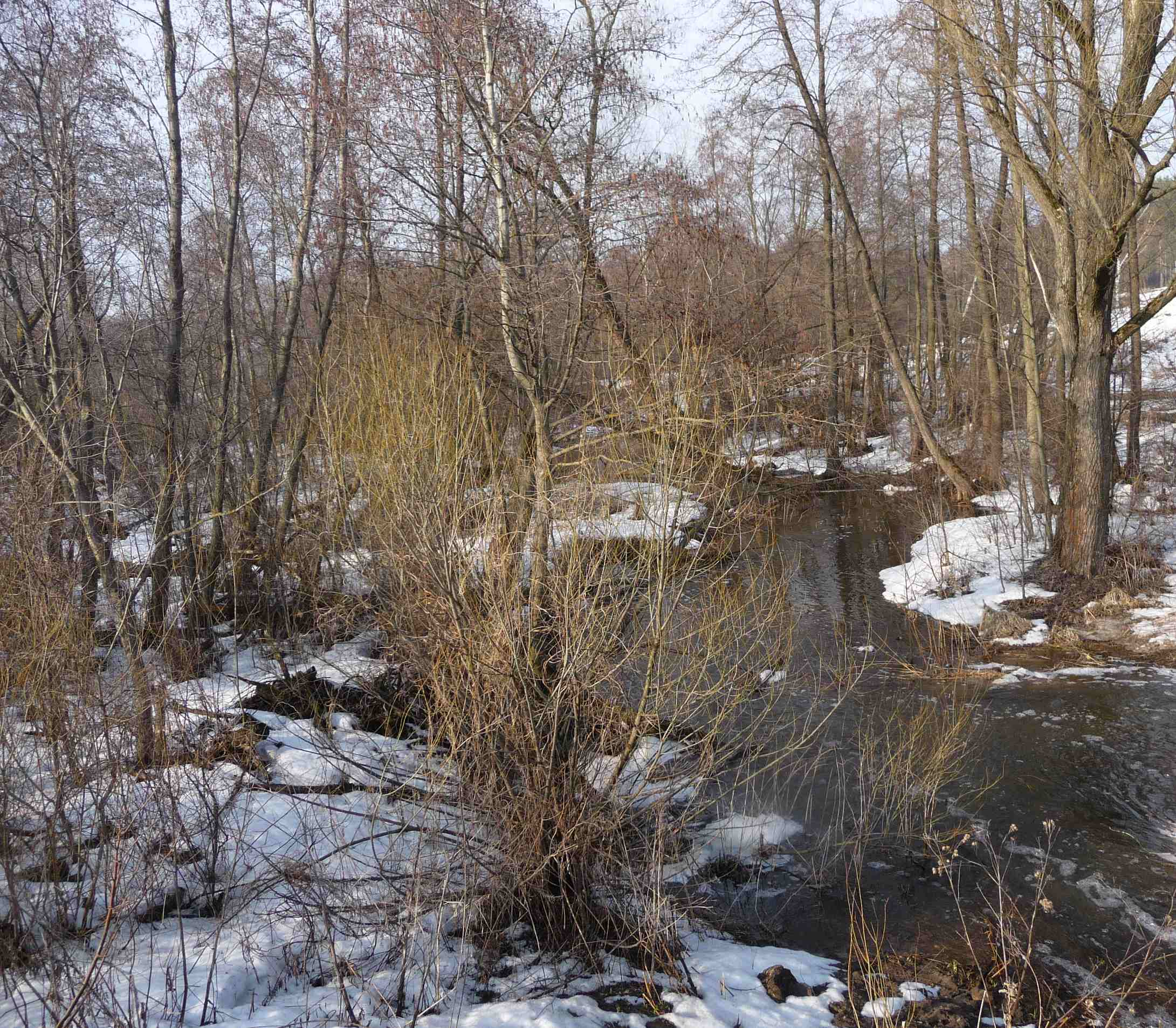 Речка Гречушка около села Здёхово. Щелковксий район Московской области.